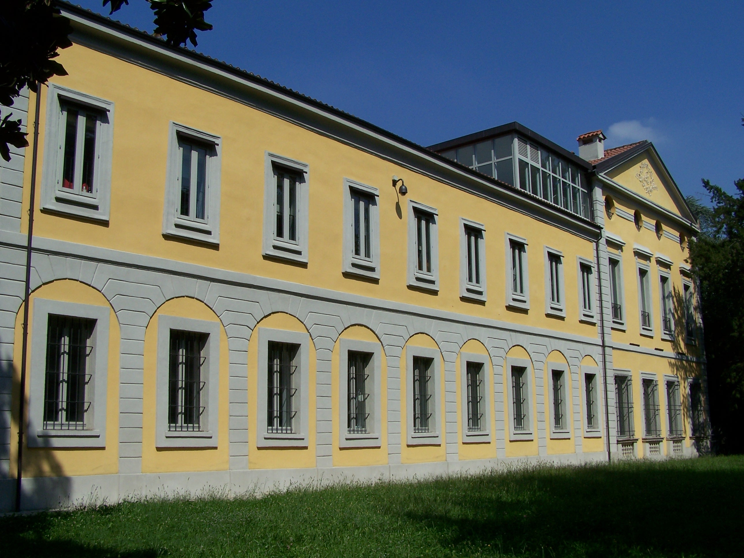 Villa di Breme Forno (solo esterni) This is a photo of a monument which is part of cultural heritage of Italy.